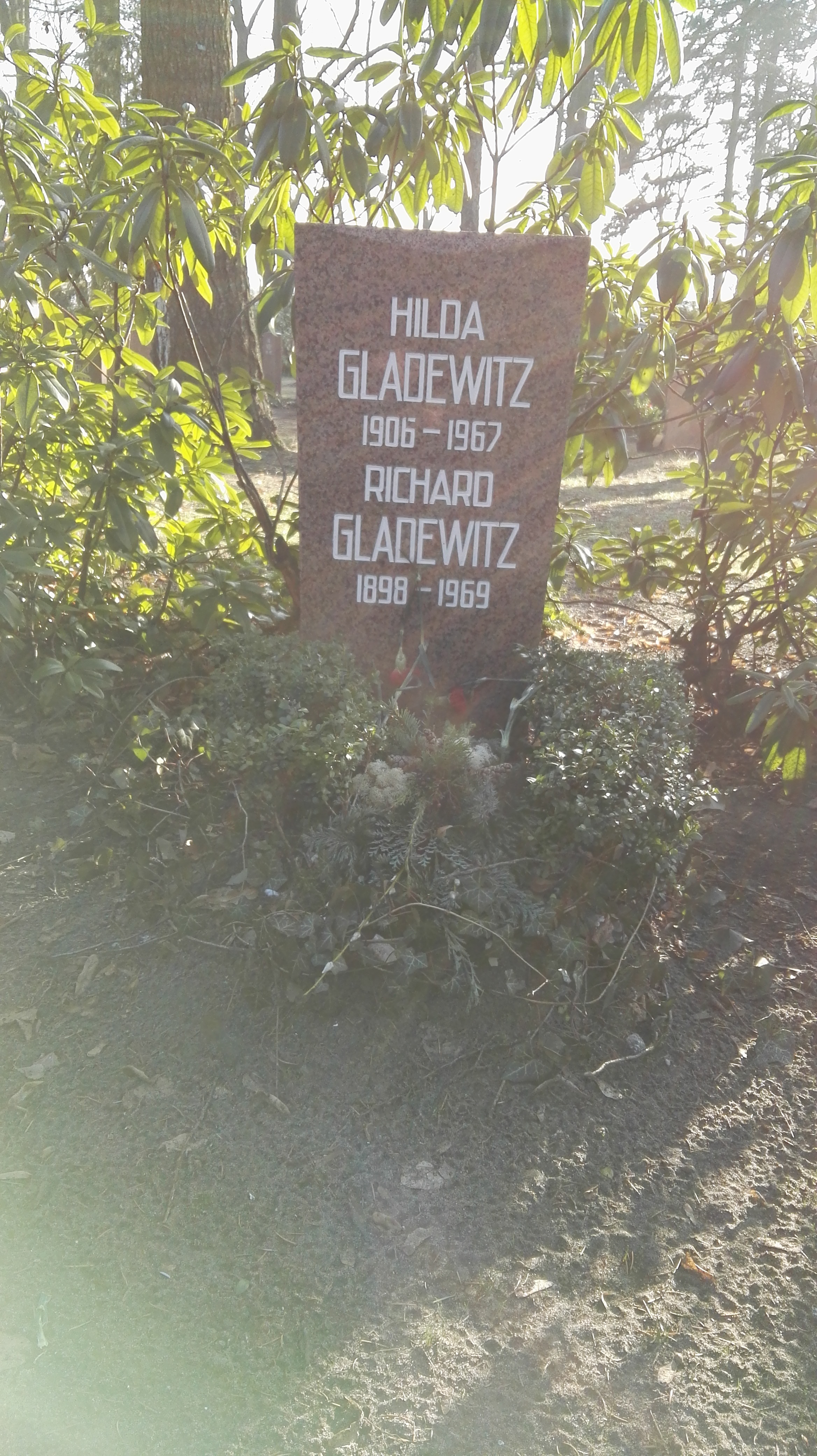 Grab von Richard Gladewitz und Hilda Gladewitz in der Grabanlage Pergolenweg auf dem Sozialistenfriedhof des Zentralfriedhofs Friedrichsfelde